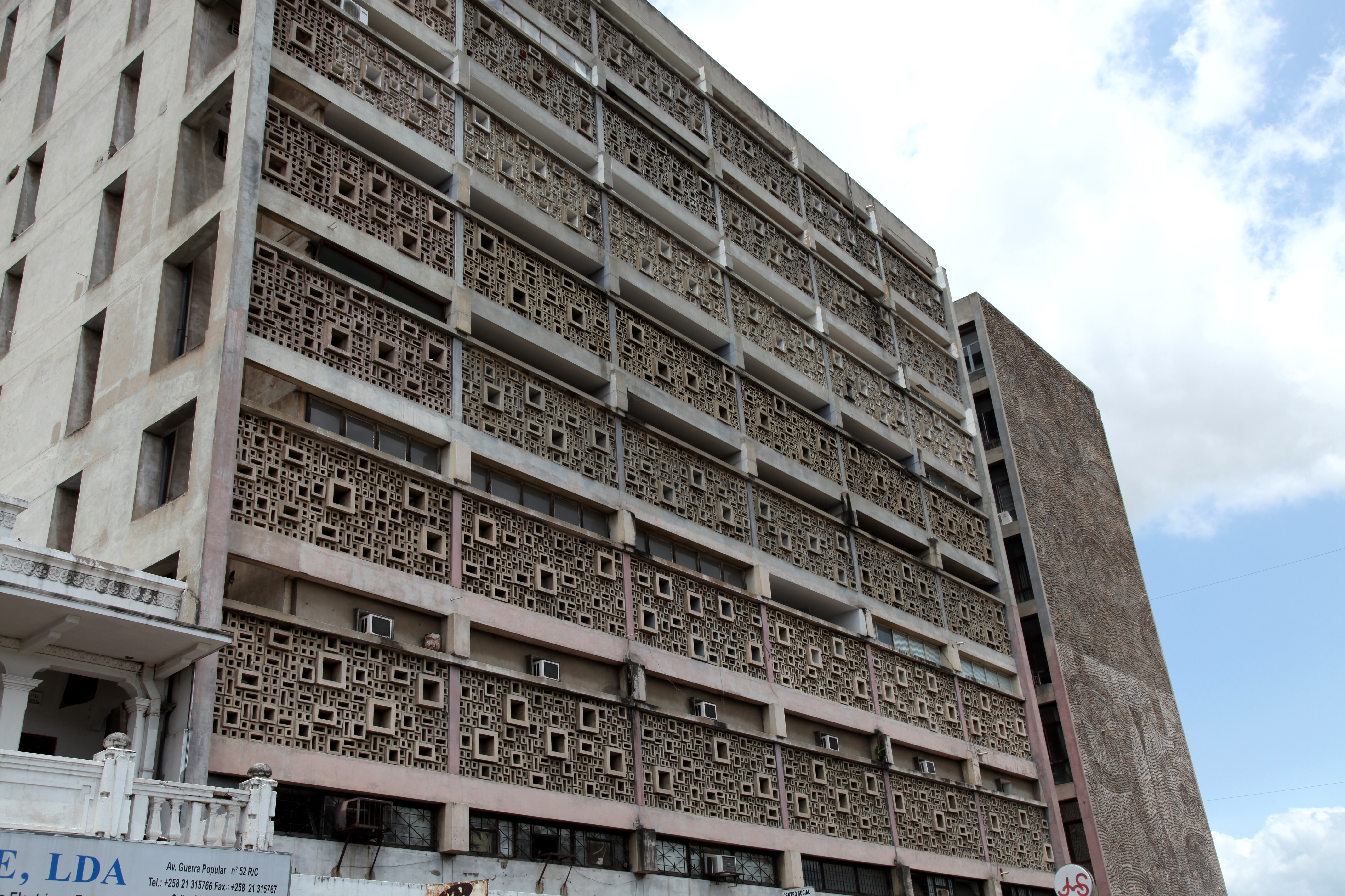 Edificio Abreu Santos e Rocha (1955), do arquitecto Pancho Guedes em Maputo, Moçambique